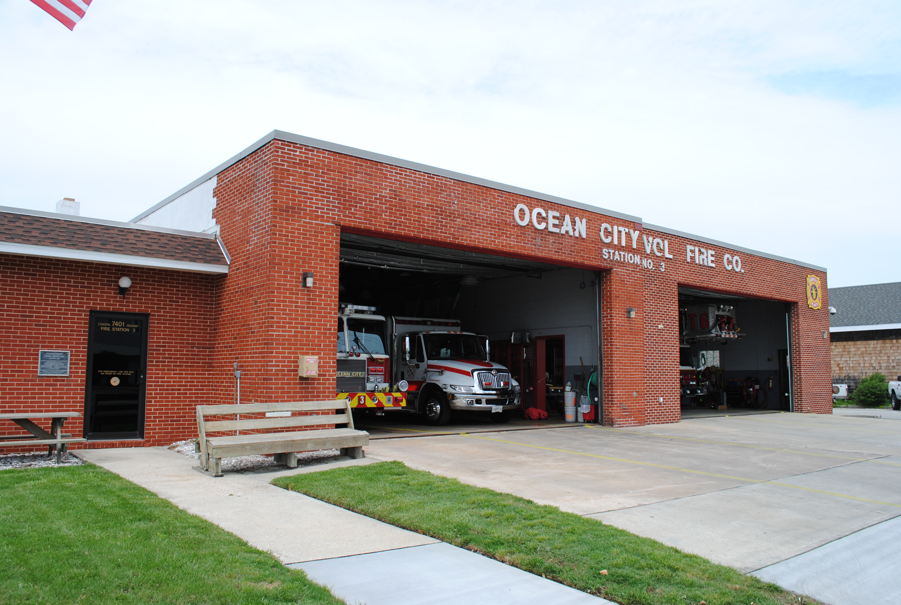 4 bays at station 3.